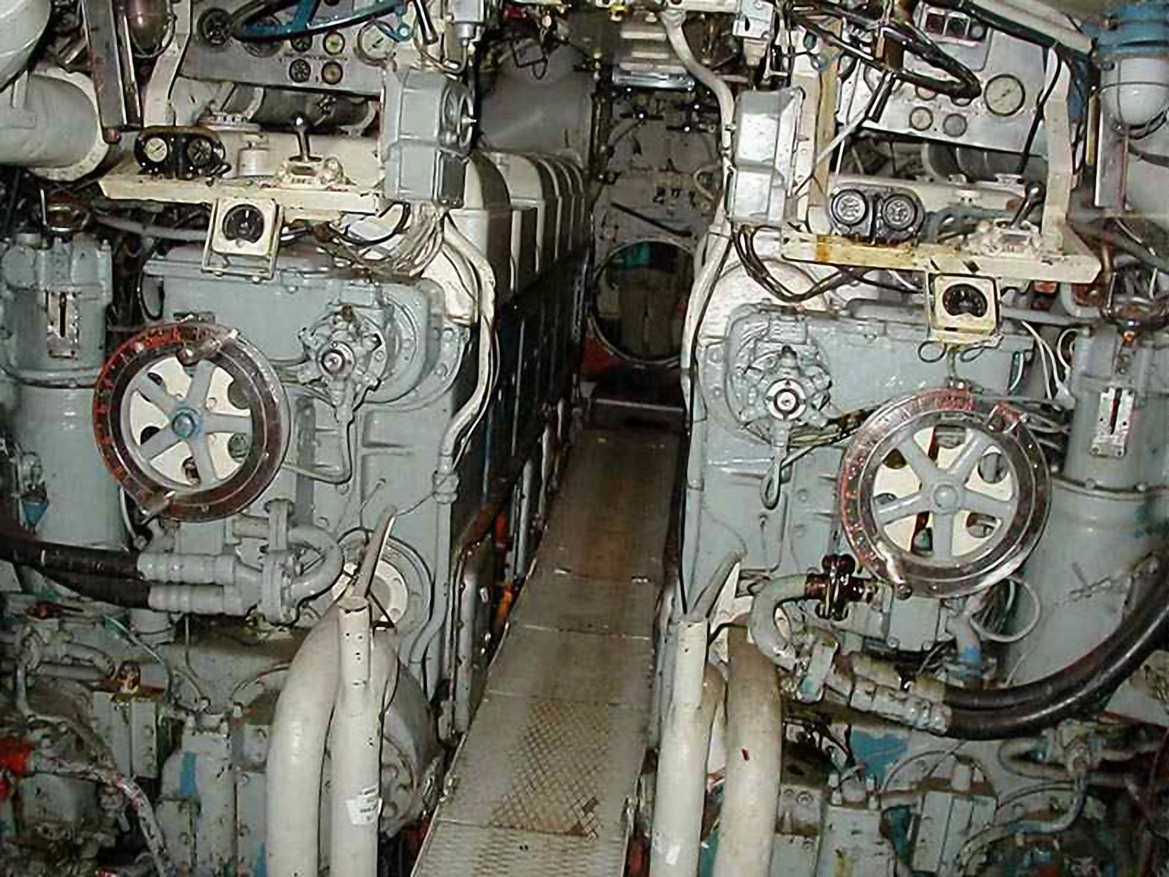 Подводные лодки проекта 613 - Модель 359 в Naksov, Дании, как корабль музей